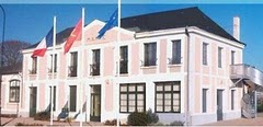 Mairie de Saint-Pierre-de-Manneville.